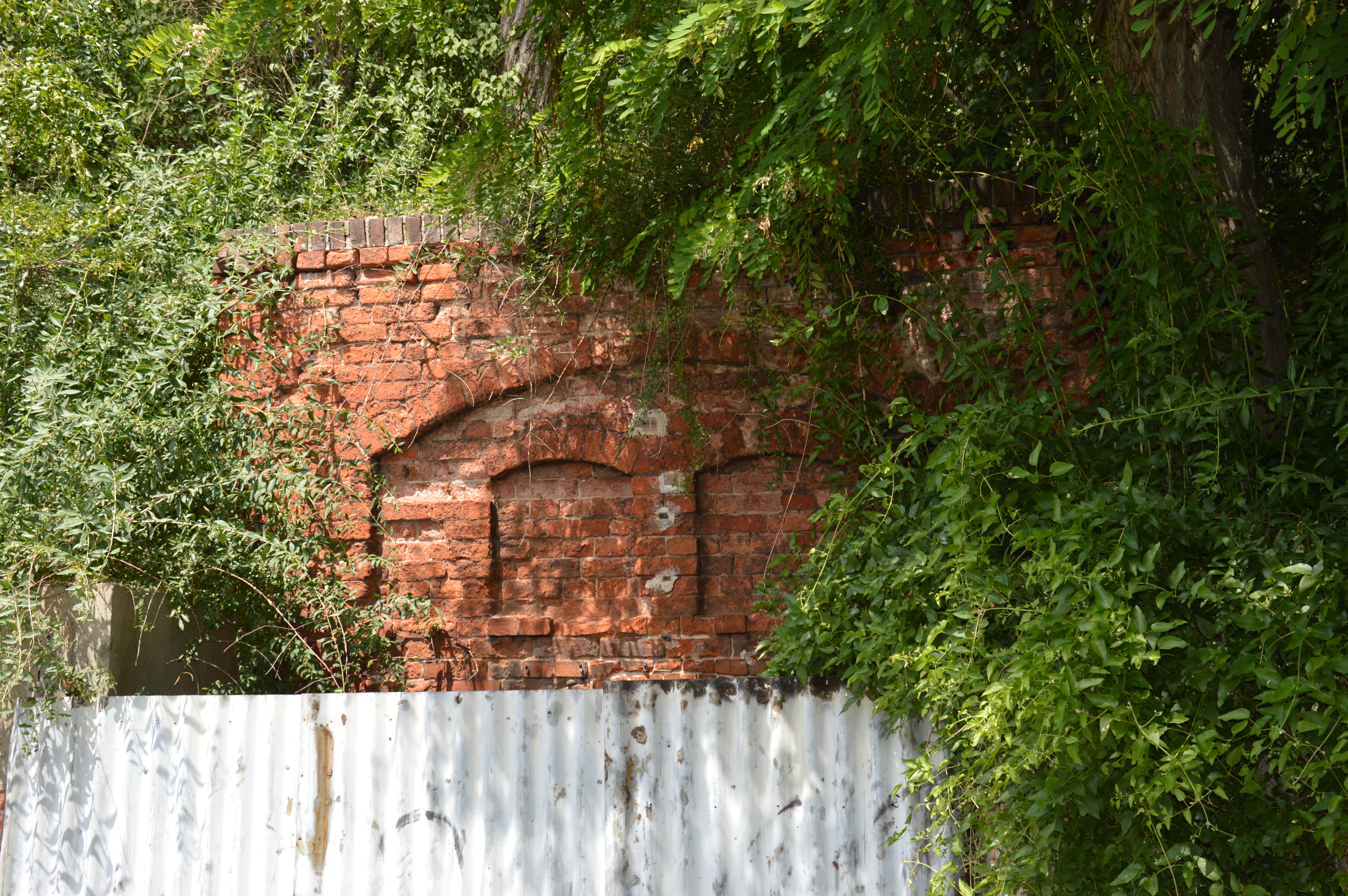 Keller Bergstraße 8a in Burg